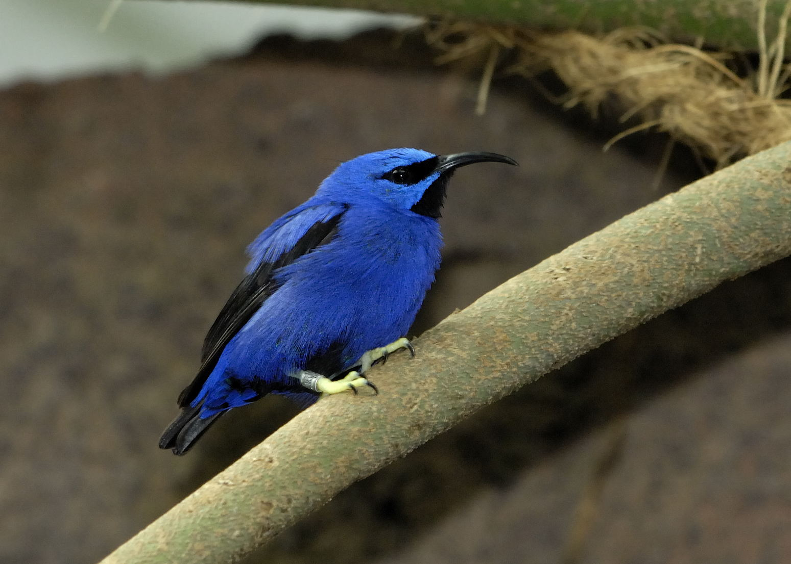 Purpurnaschvogel (Cyanerpes caeruleus) im Tiergarten Schönbrunn, Wien, Österreich